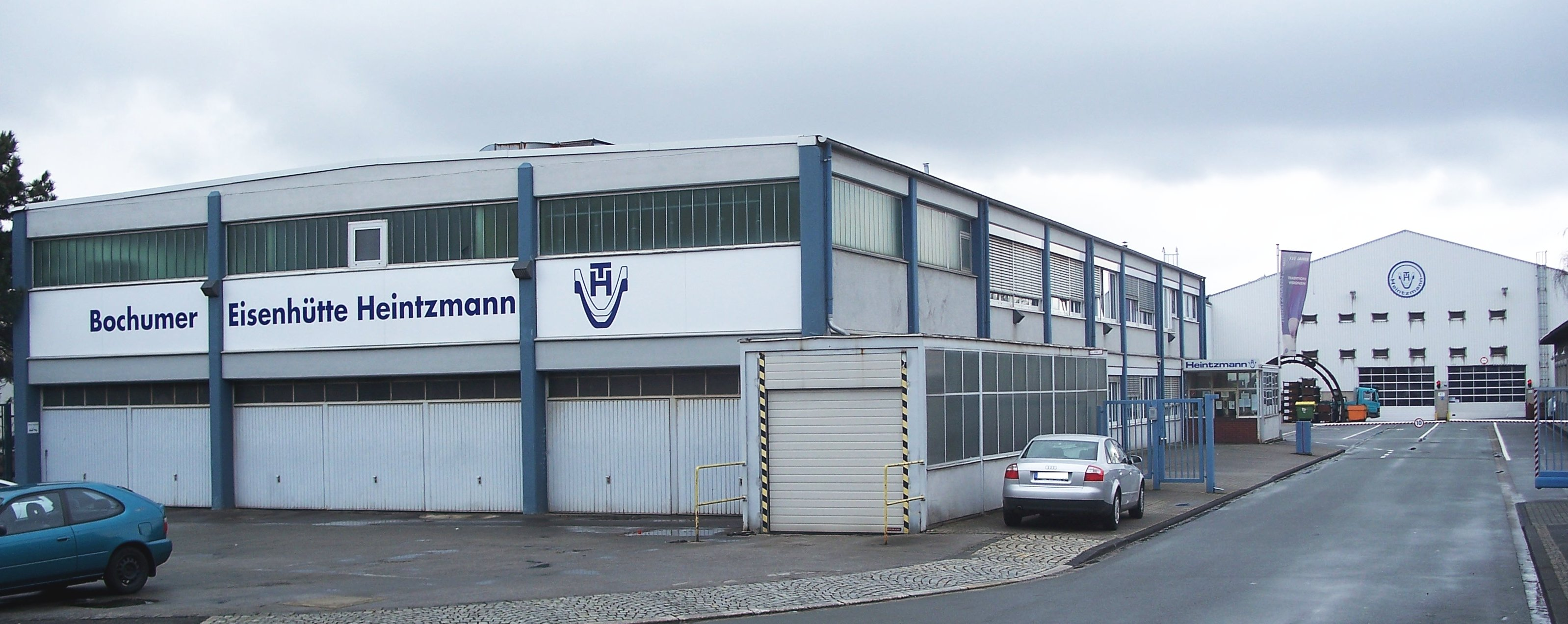 Die 1954 bezogene Betriebsstätte der Bochumer Eisenhütte Heintzmann